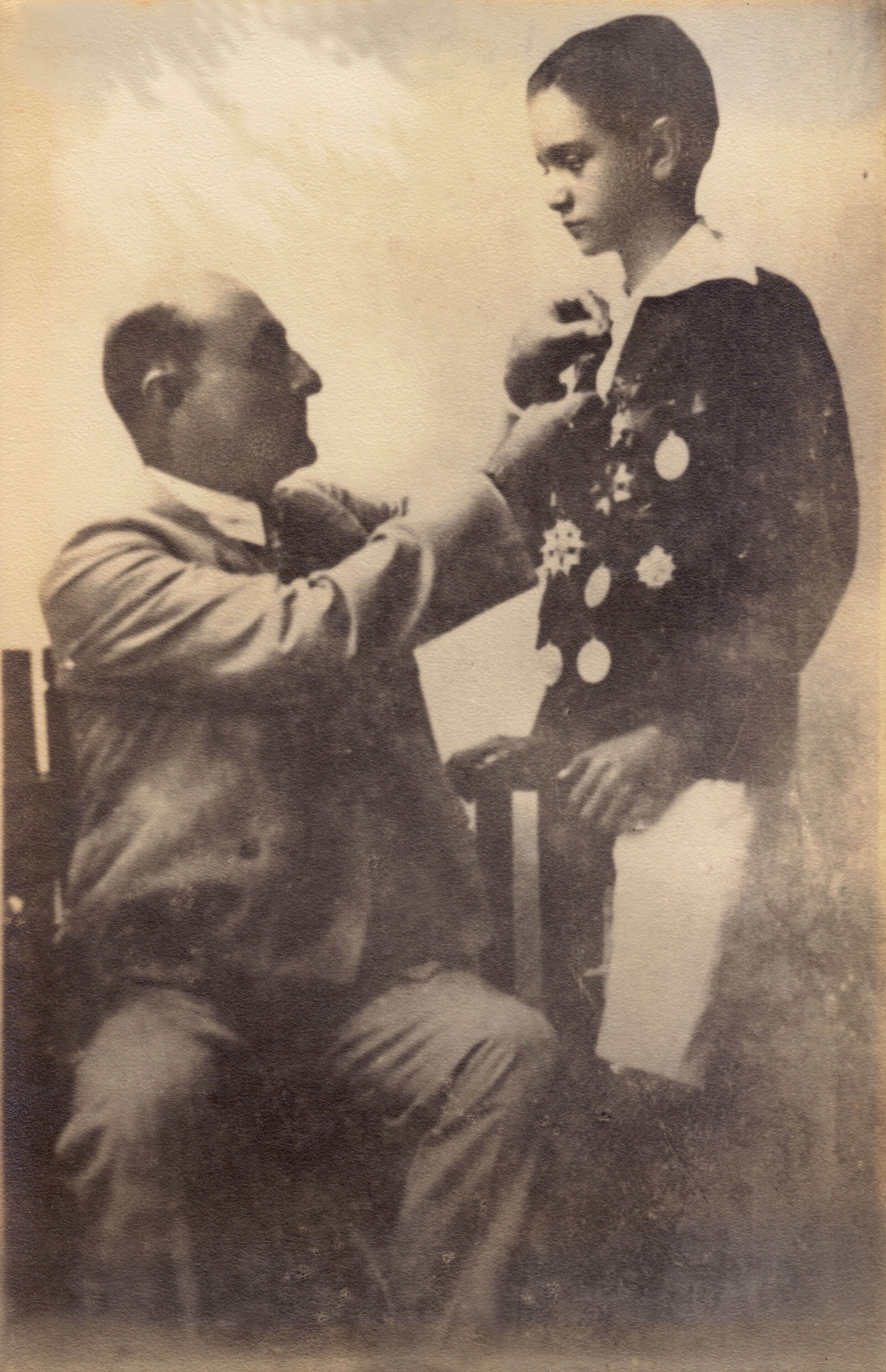 Premiación de fin de curso en el Colegio San Ignacio. Rafael Caldera batió récord al conseguir 15 medallas en su pecho. Aparece con su padre adoptivo, Tomás Liscano.